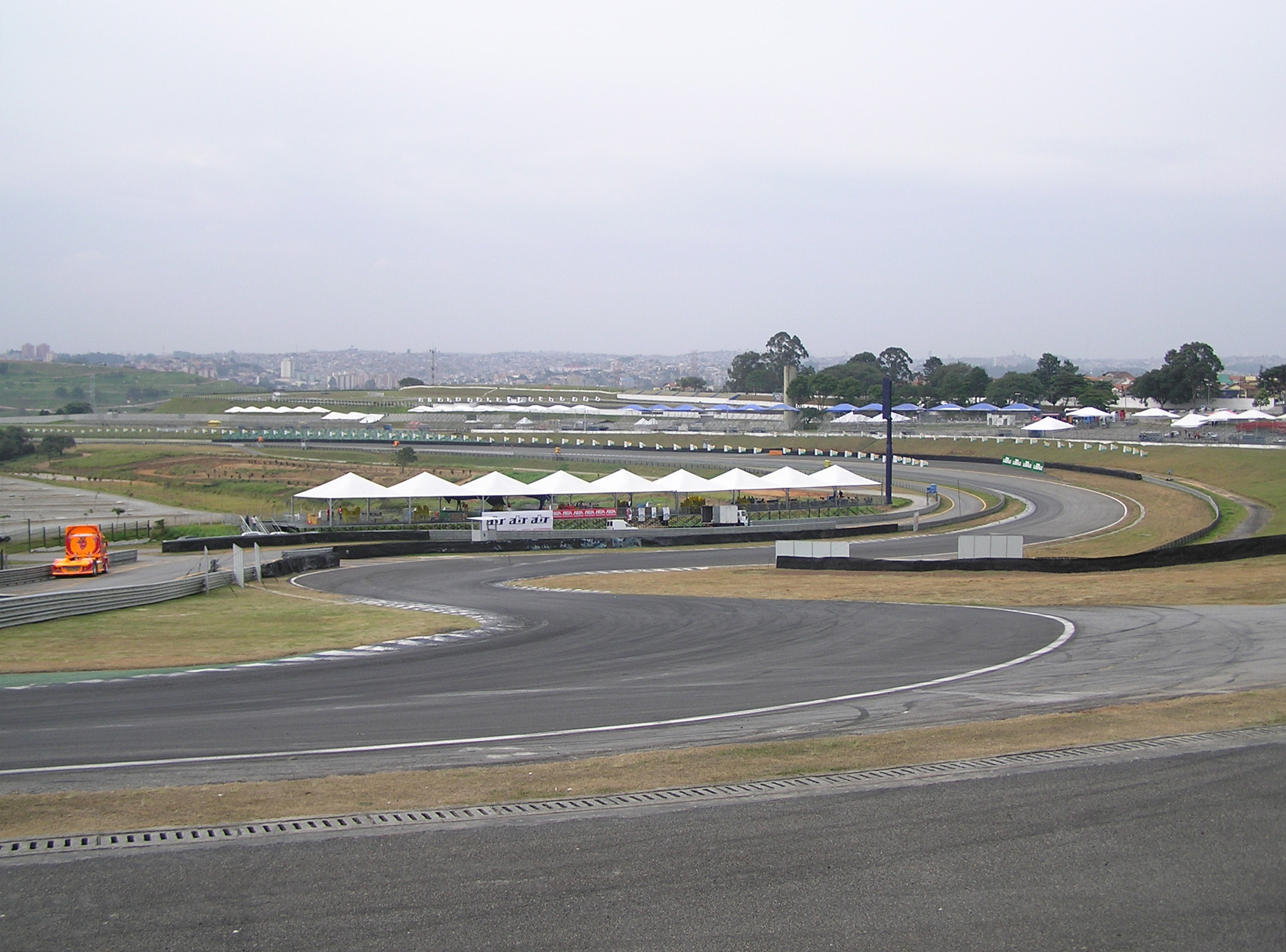 Autódromo José Carlos Pace: 'S' do Senna and Curva do Sol